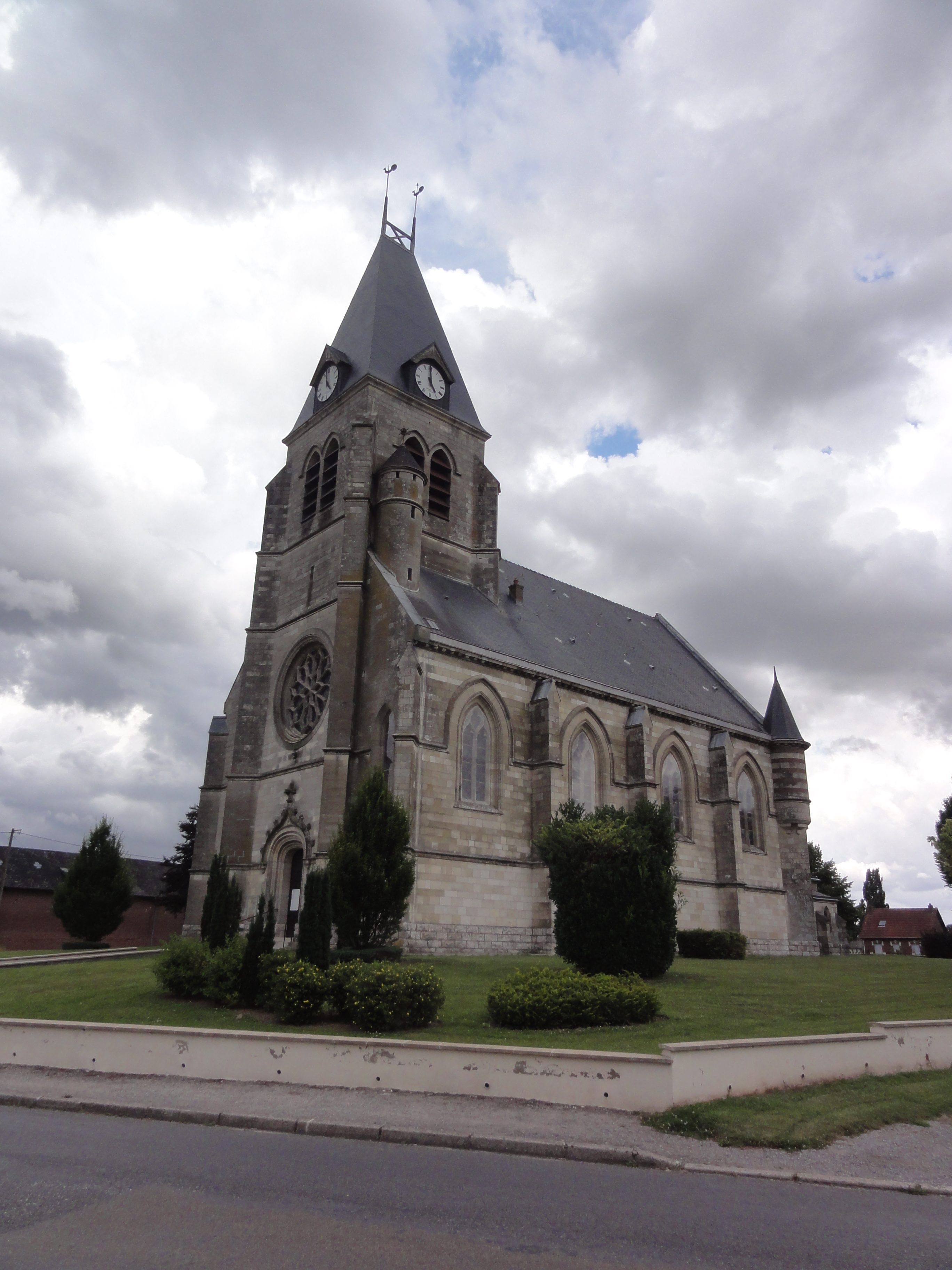 Étreillers (Aisne) église Saint-Cyr-et-Sainte-Julitte